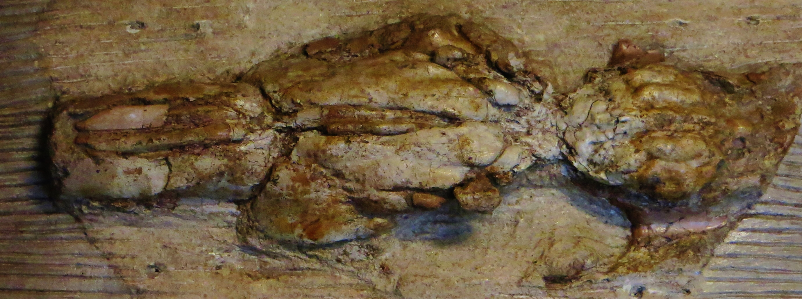 Fossil of Dicrocerus, an extinct mammal - Took the photo at Musee d'Histoire Naturelle, Paris